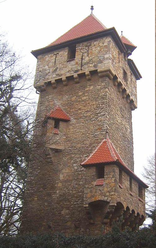 Beschreibung: Schloss Neugattersleben (Wachturm) * Quelle: selbst fotografiert * Fotograf: M.K. (Neuga) * Datum: 02.02.2006 * from de.wikipedia [1] 17:08, 3. Feb 2006 . . Neuga (Diskussion) . . 1944 x 2592 (3066567 Byte)